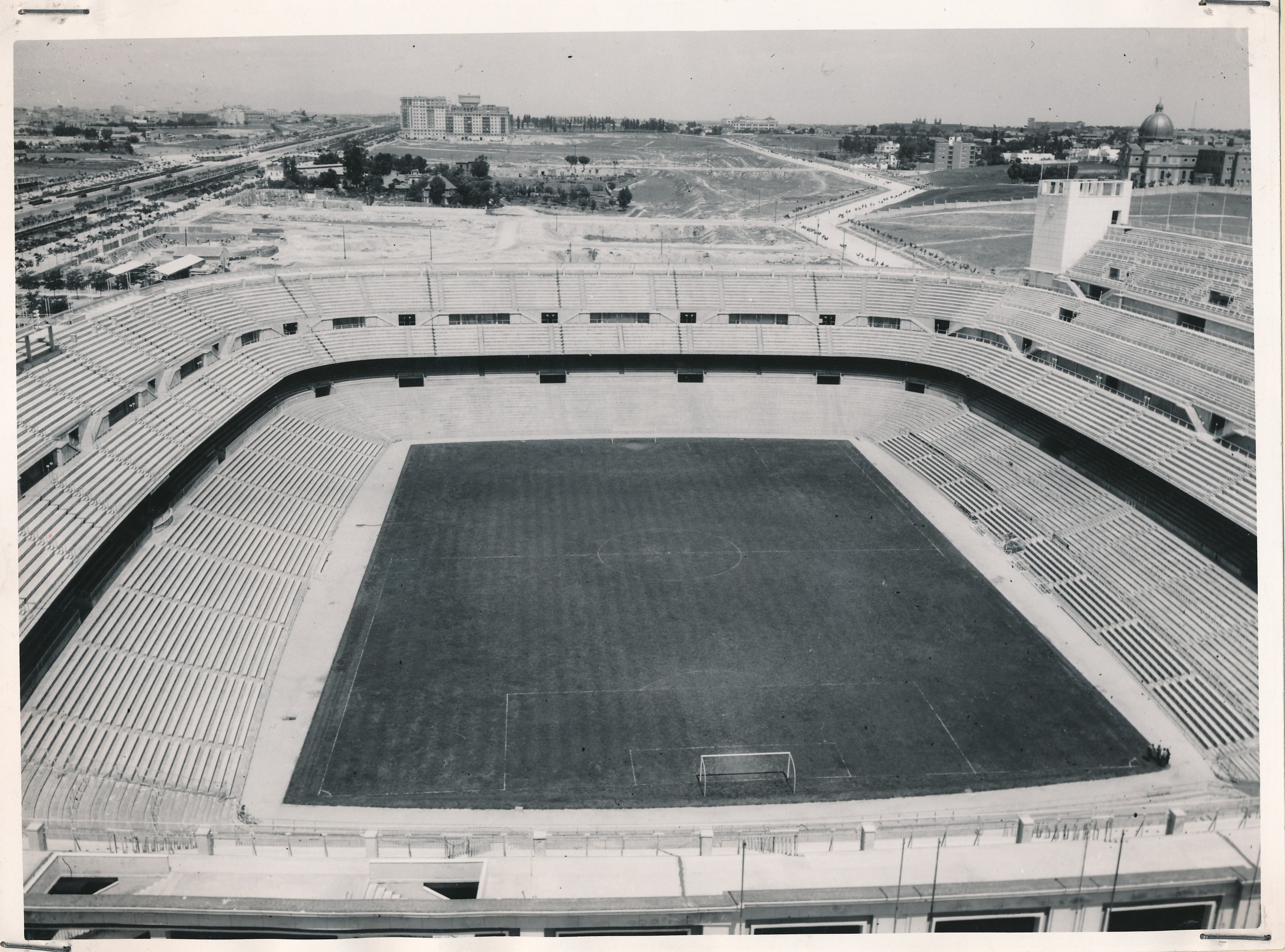 Madrid, 1955 Procedencia: Archivo Fotográfico de la Dirección General de Turismo (1951-1992) Fotógrafo: Ministerio de Información y Turismo Registro nº: 00045 Signatura: Caja 1 Fondos: Biblioteca de la Facultad de Empresa y Gestión Pública (Universidad de Zaragoza) Legado: Luis Fernández Fuster / E.S. Turismo Huesca